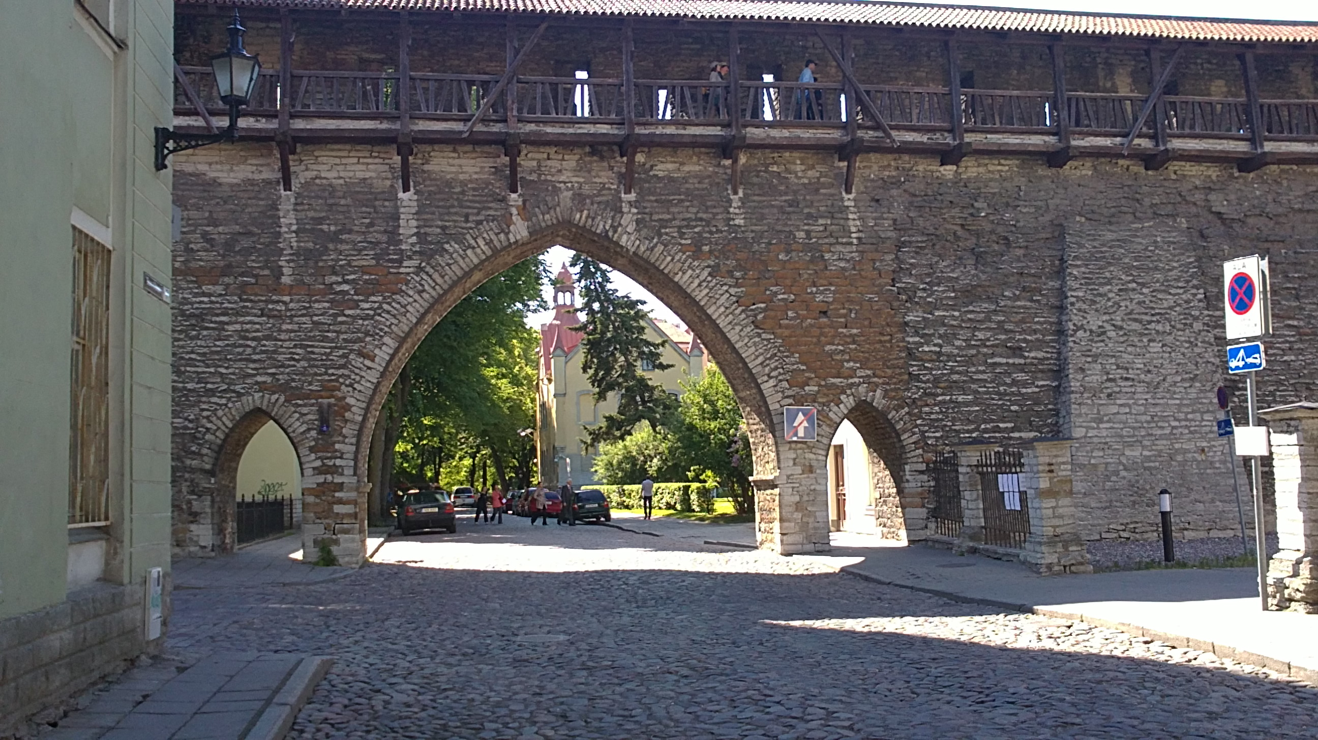 Tallinna vanalinna Kloostrivärav (ka Nunnavärav), ehitatud pärast läbimurde tegemist Tallinna linnamüüri 19. sajandi lõpus Wilhelm Neumanni projekti järgi, vaade Laia tänava ja Suur-Kloostri tänava poolt